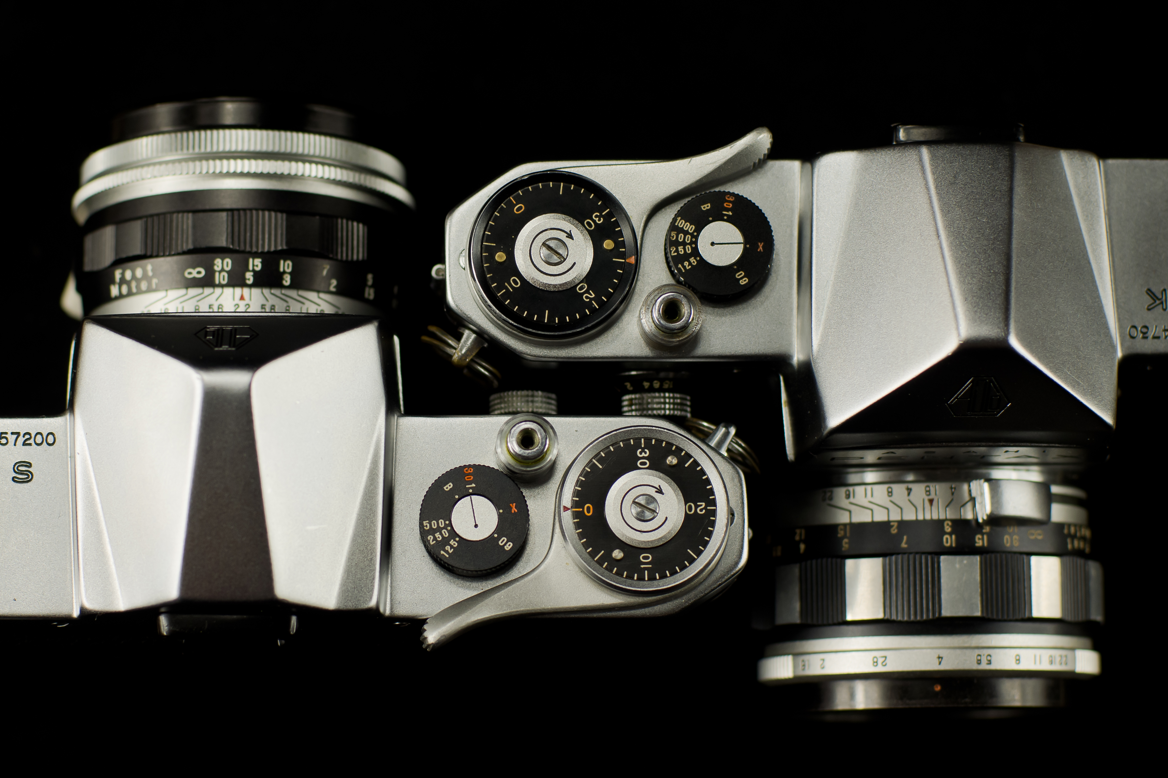 Рычаг взвода и головка выдержек камер Asahi Pentax K и S